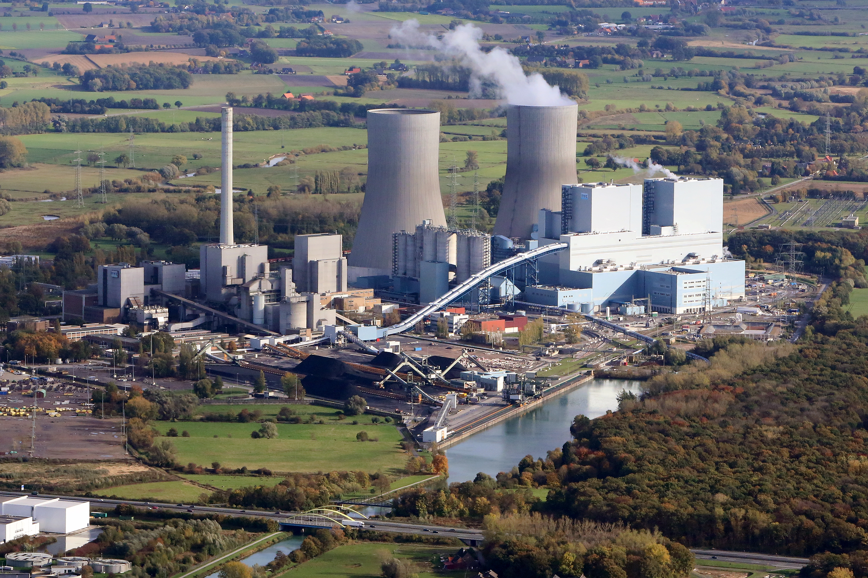 Luftbild RWE-Kraftwerk Westfalen 2013, rechts Umspannanlage „Lippborg“ (ehem. Umspannwerk „Uentrop“ genannt)